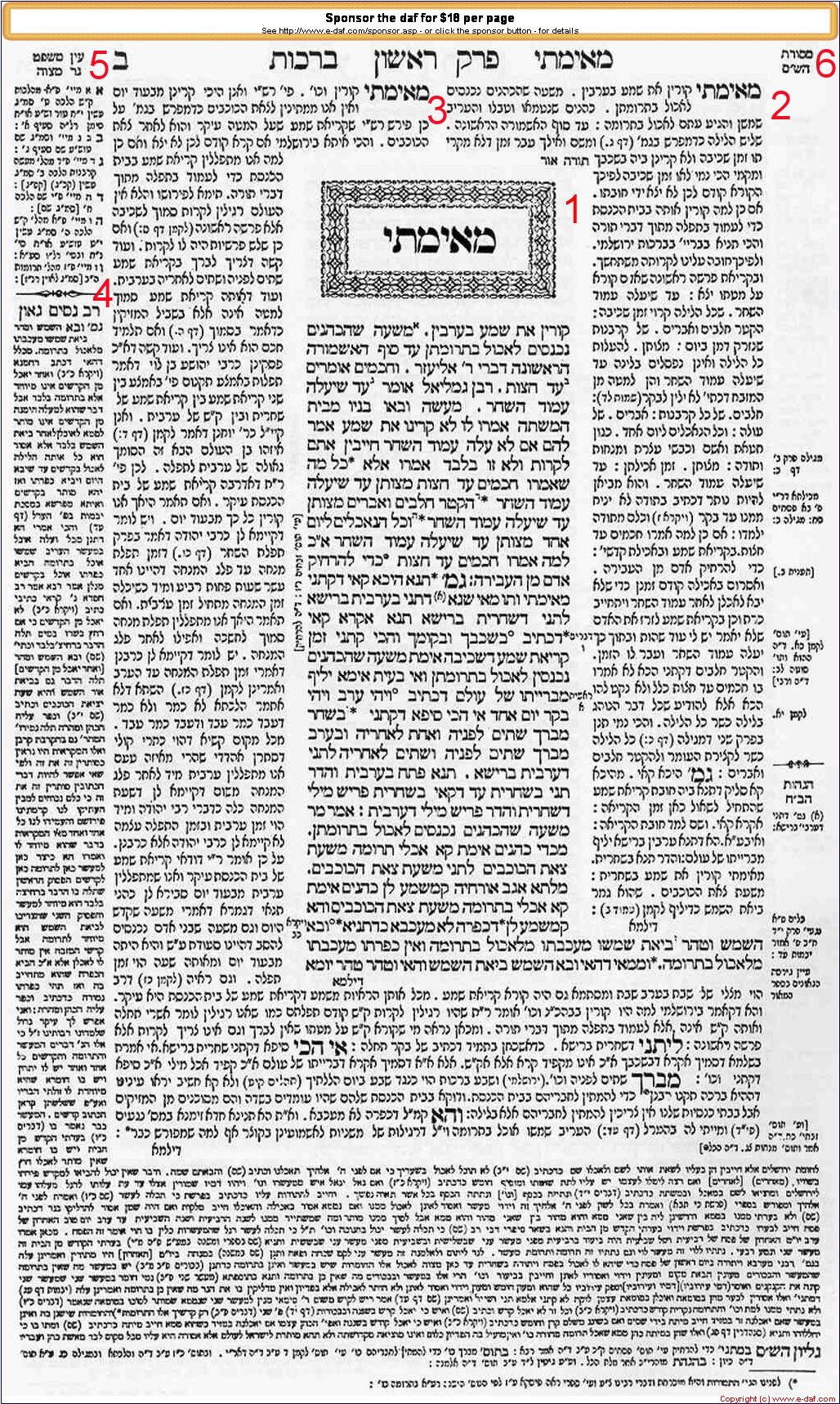 ברכות 2 א'